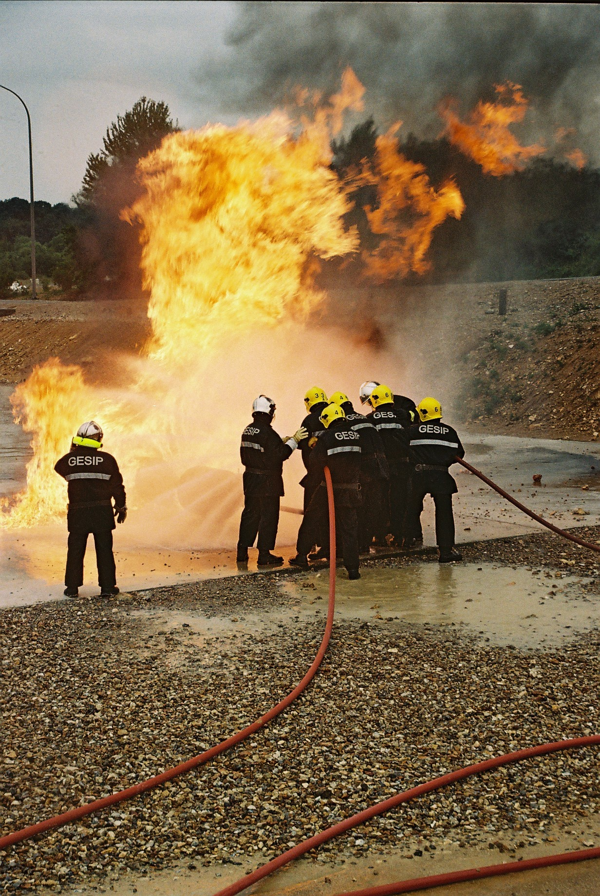 תרגיל כיבוי אש